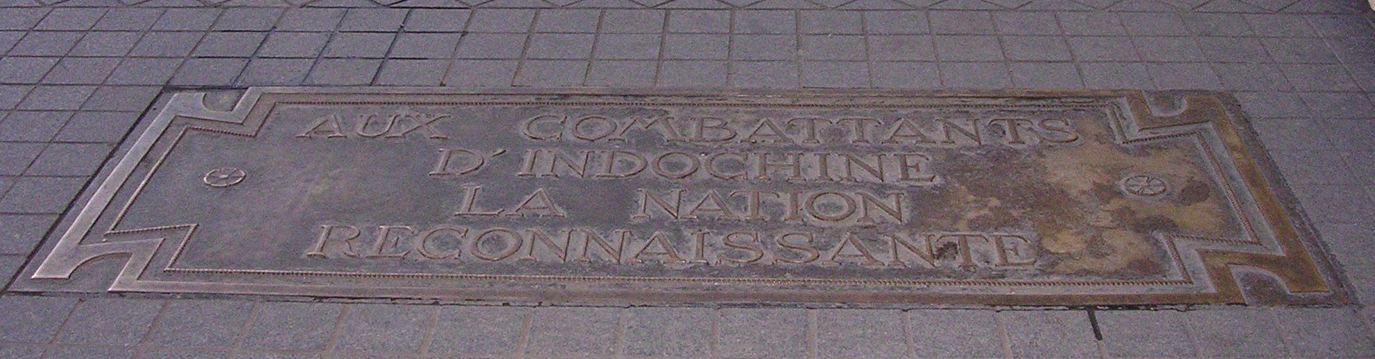 Placa conmemorativa a los caídos en Indochina bajo el Arco del Triunfo en París